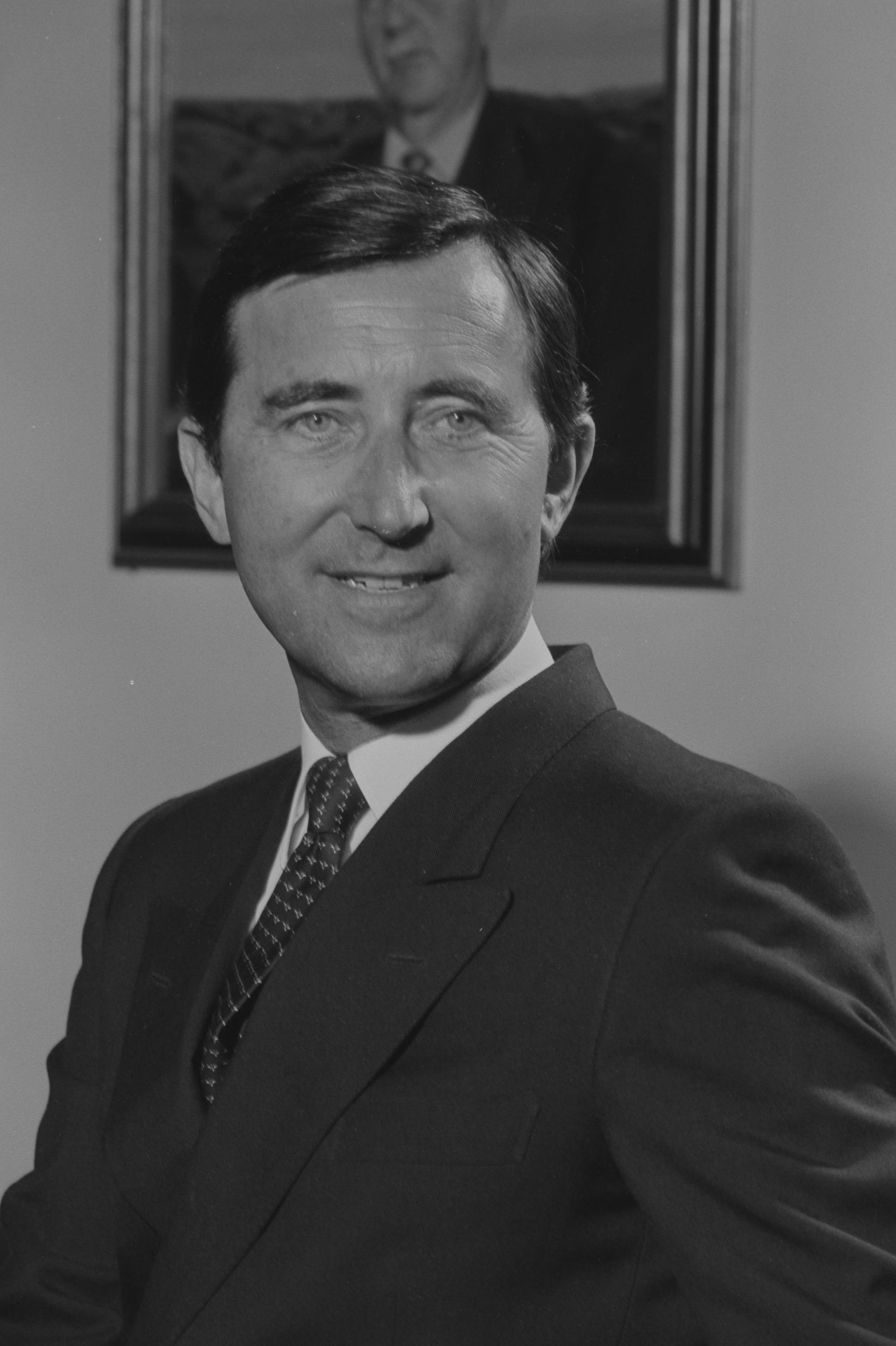 Martin Purtscher, hier in seiner Funktion als Landtagspräsident, war von 1987 bis 1997 Landeshauptmann von Vorarlberg.